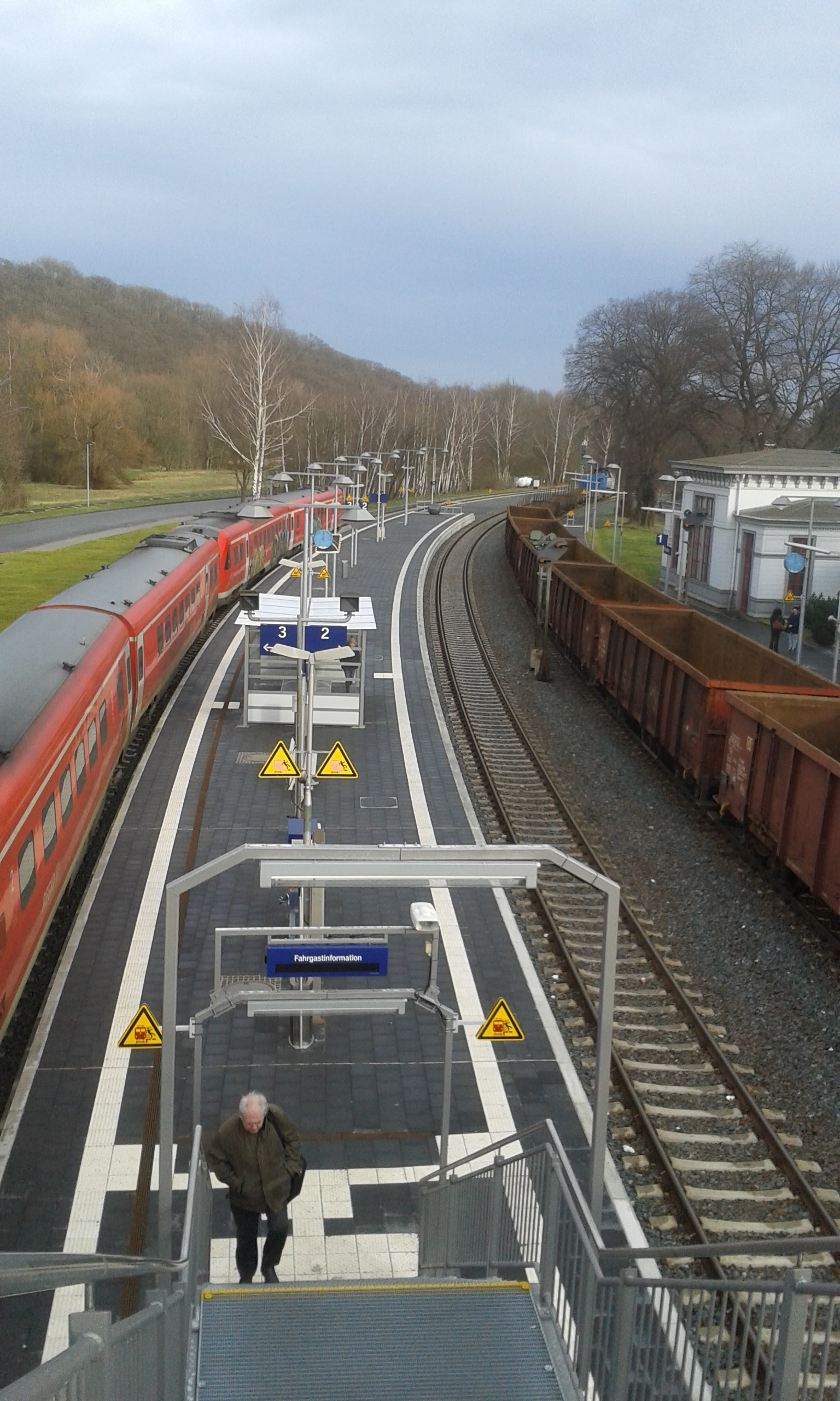 Blick auf den Inselbahnsteig. Auf Gleis 3 steht abfahrtsbereit der RE 4 nach Goslar.